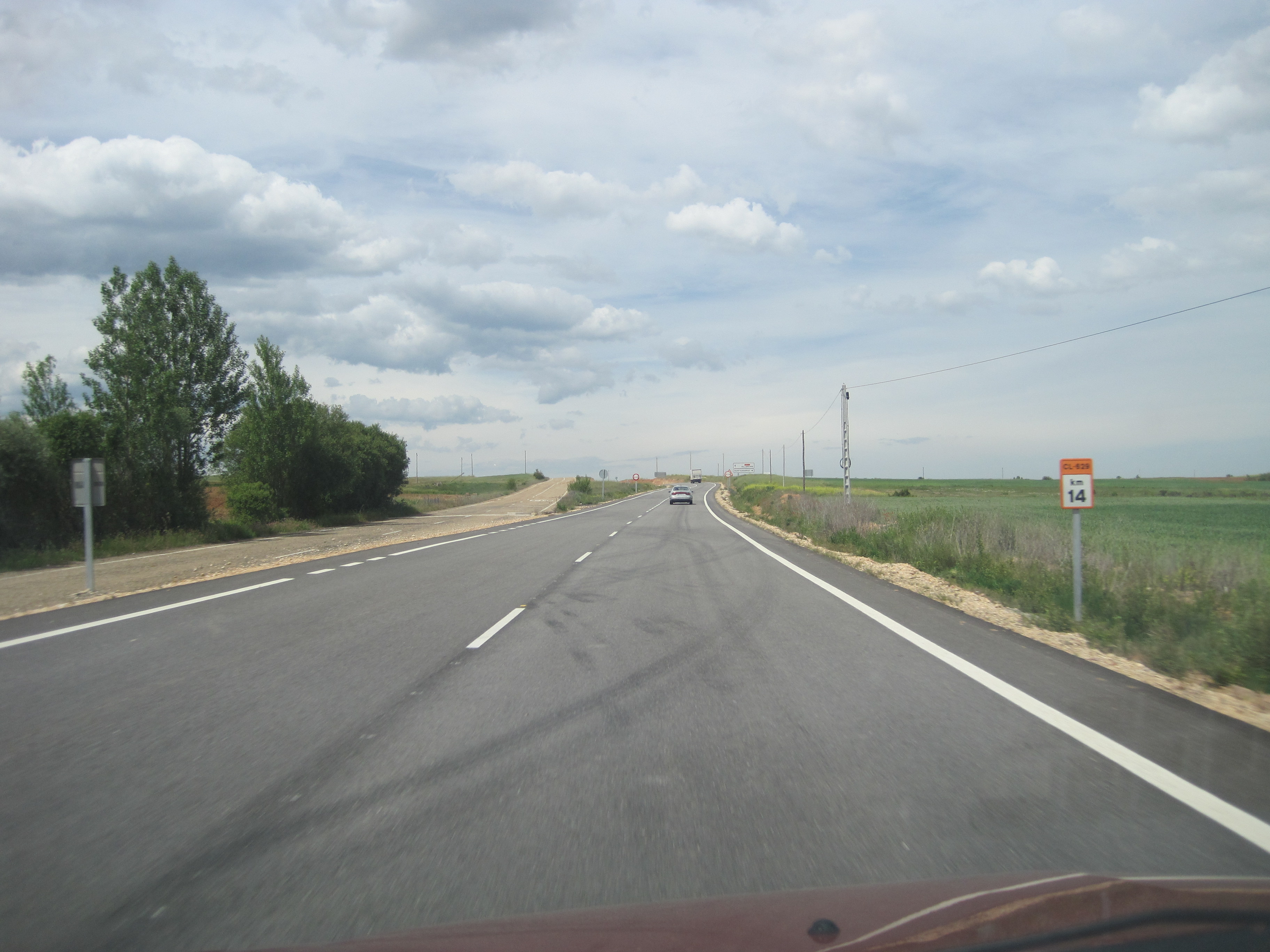 Carretera CL-629, reformada en buena parte del trazado.